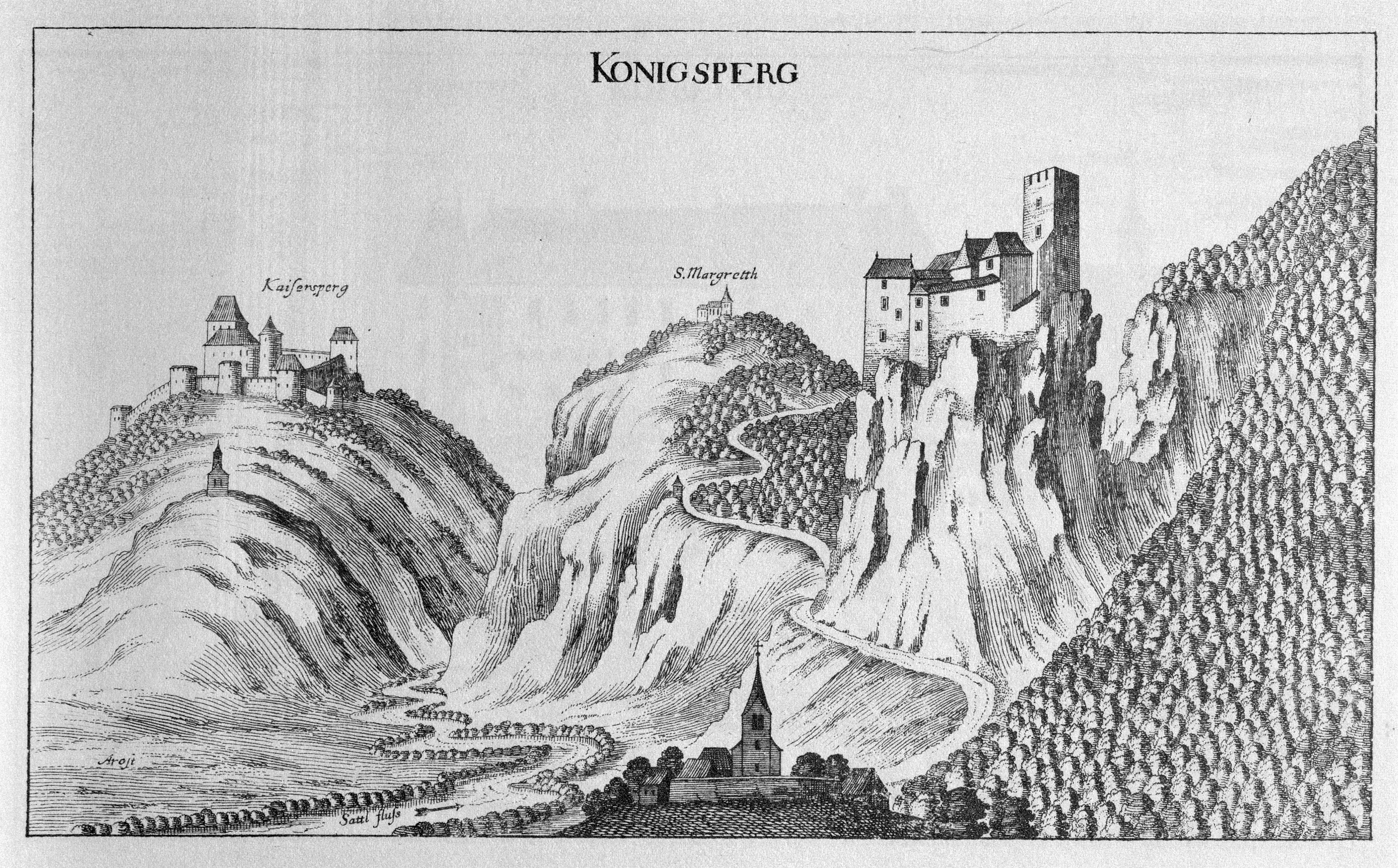 G. M. Vischers Käyserlichen Geographi, Topographia Ducatus Stiriae, Das ist: Eigentliche Delineation / und Abbildung aller Städte / Schlösser / Marcktfleck / Lustgärten / Probsteyen / Stiffter / Clöster und Kirchen / so es sich im Herzogthumb Steyrmarck befinden; Und anjetzo Umb einen billichen Preyß zu finden seynd Bey Johann Bitsch Universitäts Buchhandlern / Auff dem Juden=Platz bey der guldenen Saulen. Graz 1681 Die Nummerierung der Dateien folgt der alphabetischen Reihung der Ortsnamen